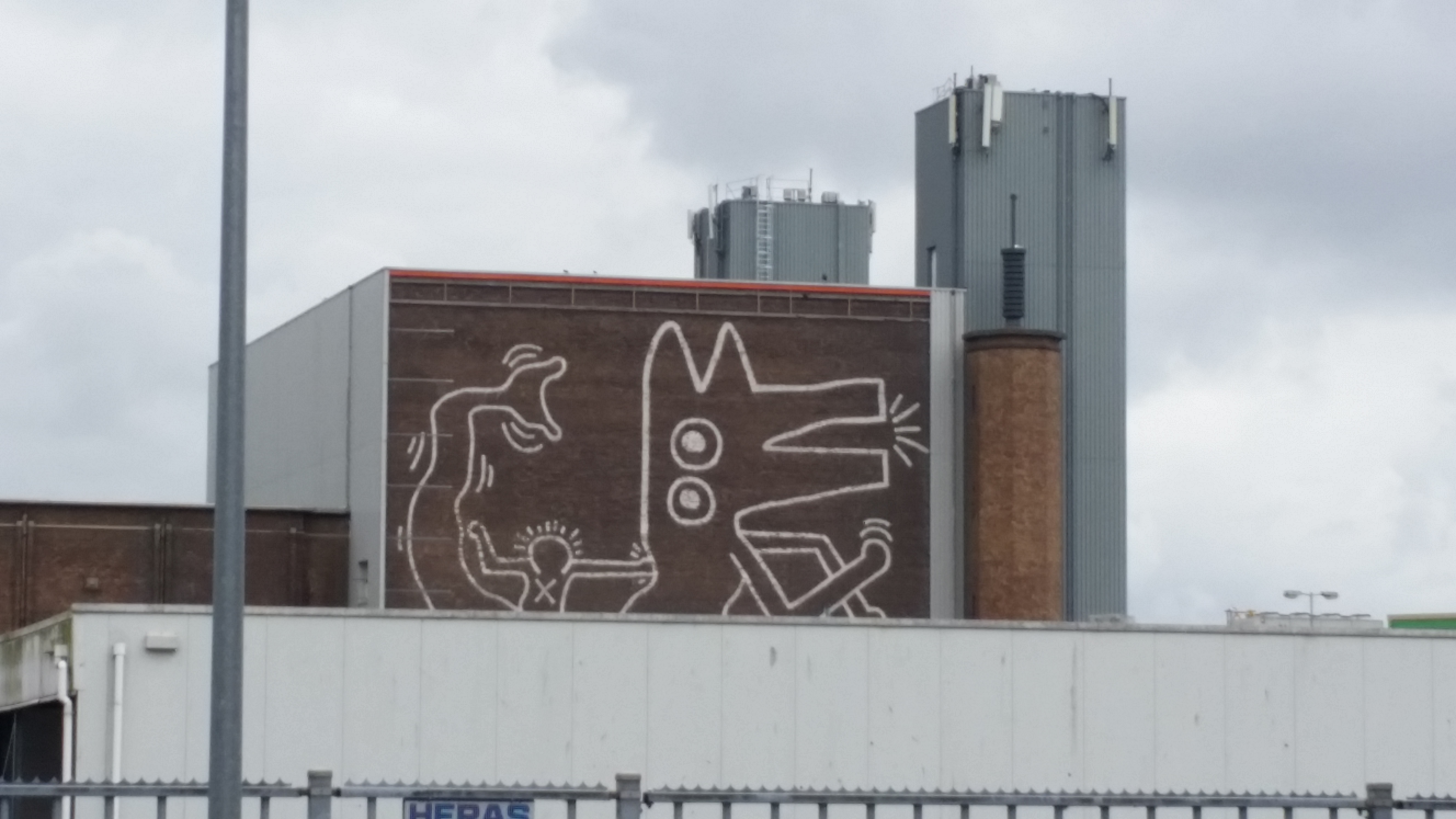 Mural van Keith Haring op gebouw Central Markthallen, Amsterdam-West